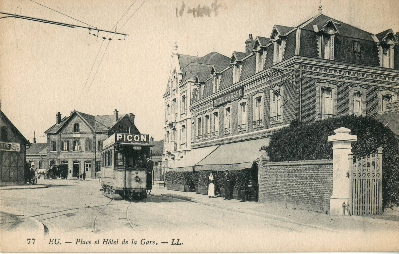 Carte postale ancienne éditée par LL, n°77 : EU - Place et Hôtel de la Gare